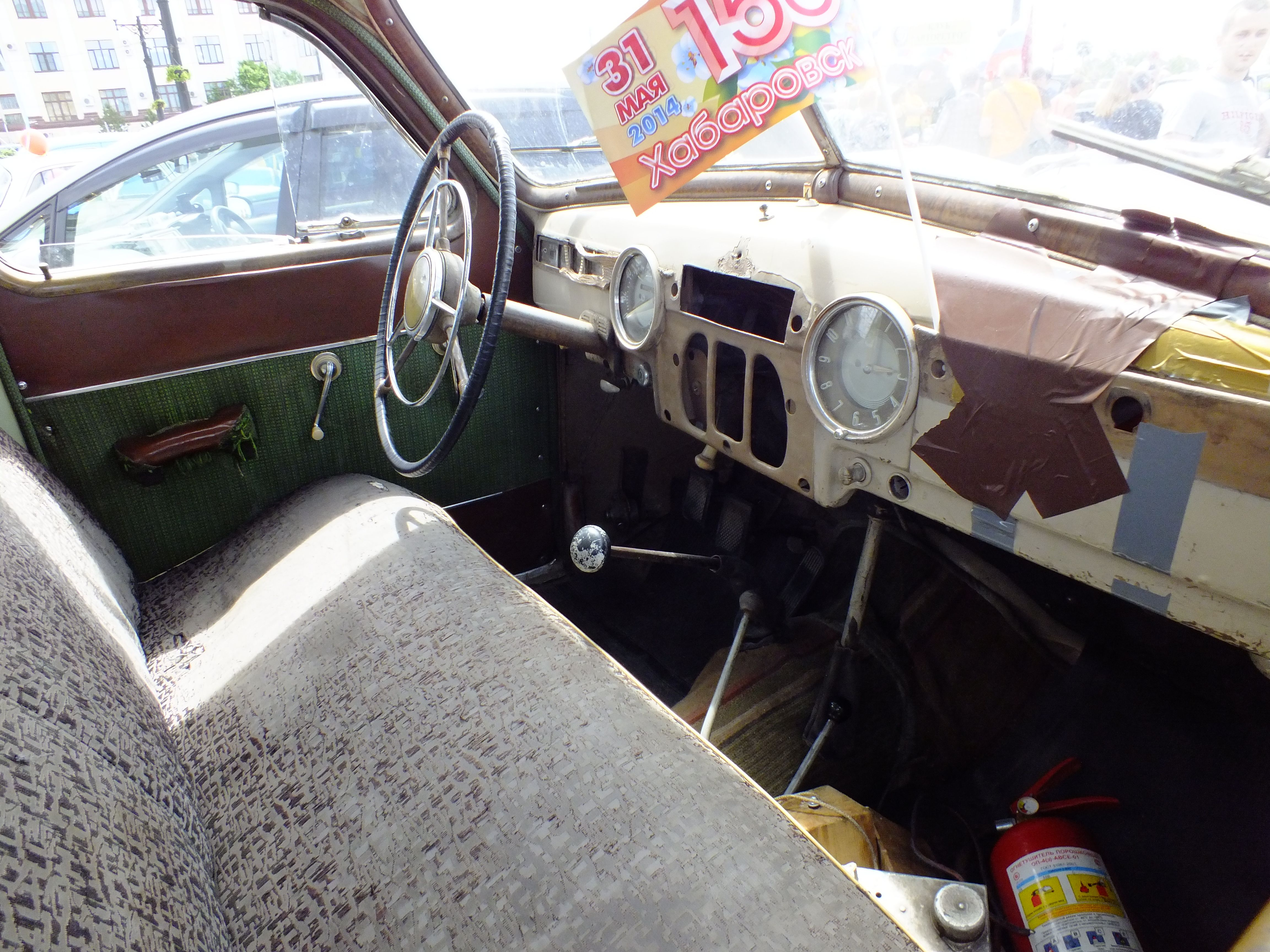 GAZ-M-72